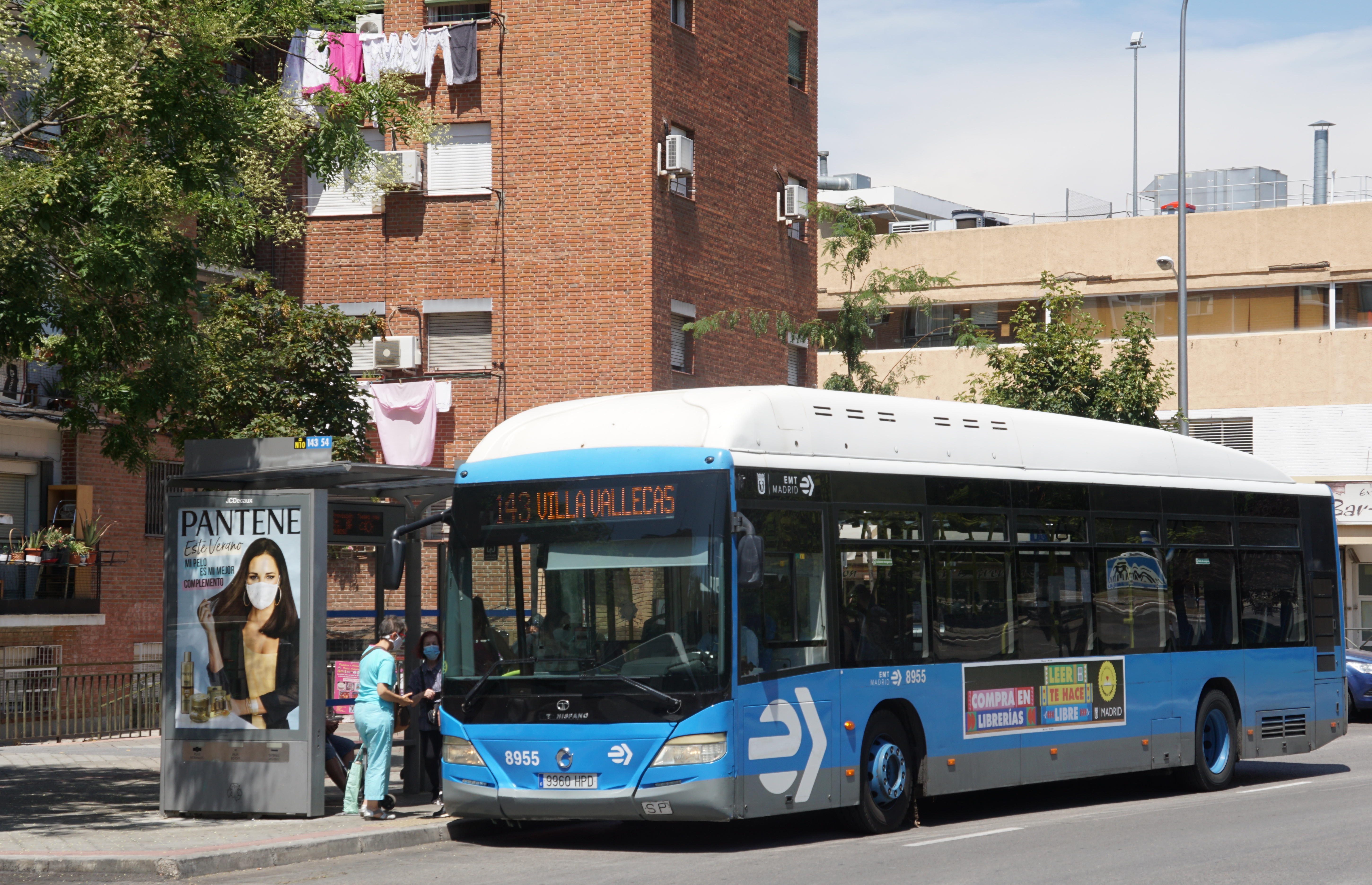 143 EMT Madrid en el final de Pavones